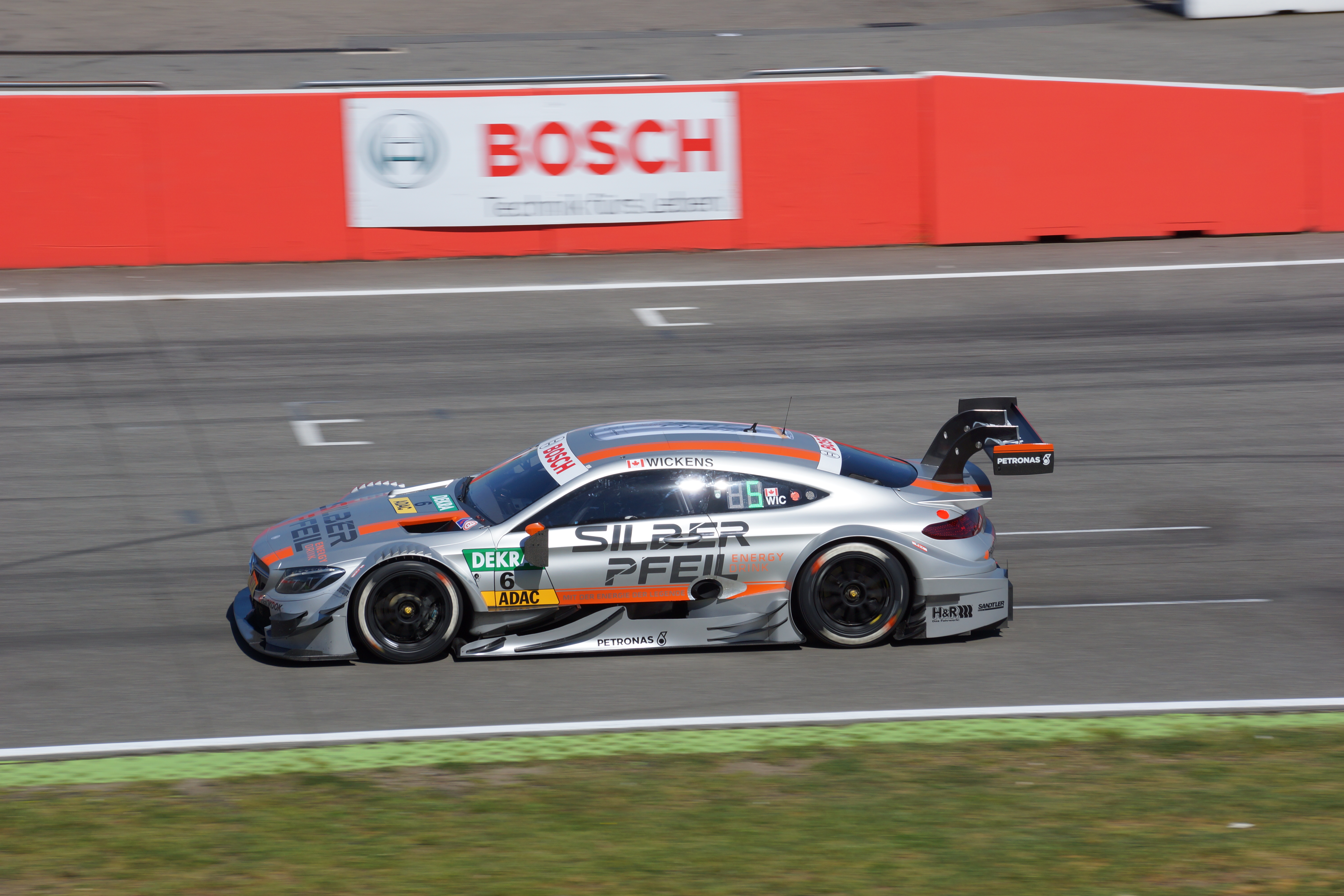 DTM. 08.05.2016 in Hockenheim. Race 2